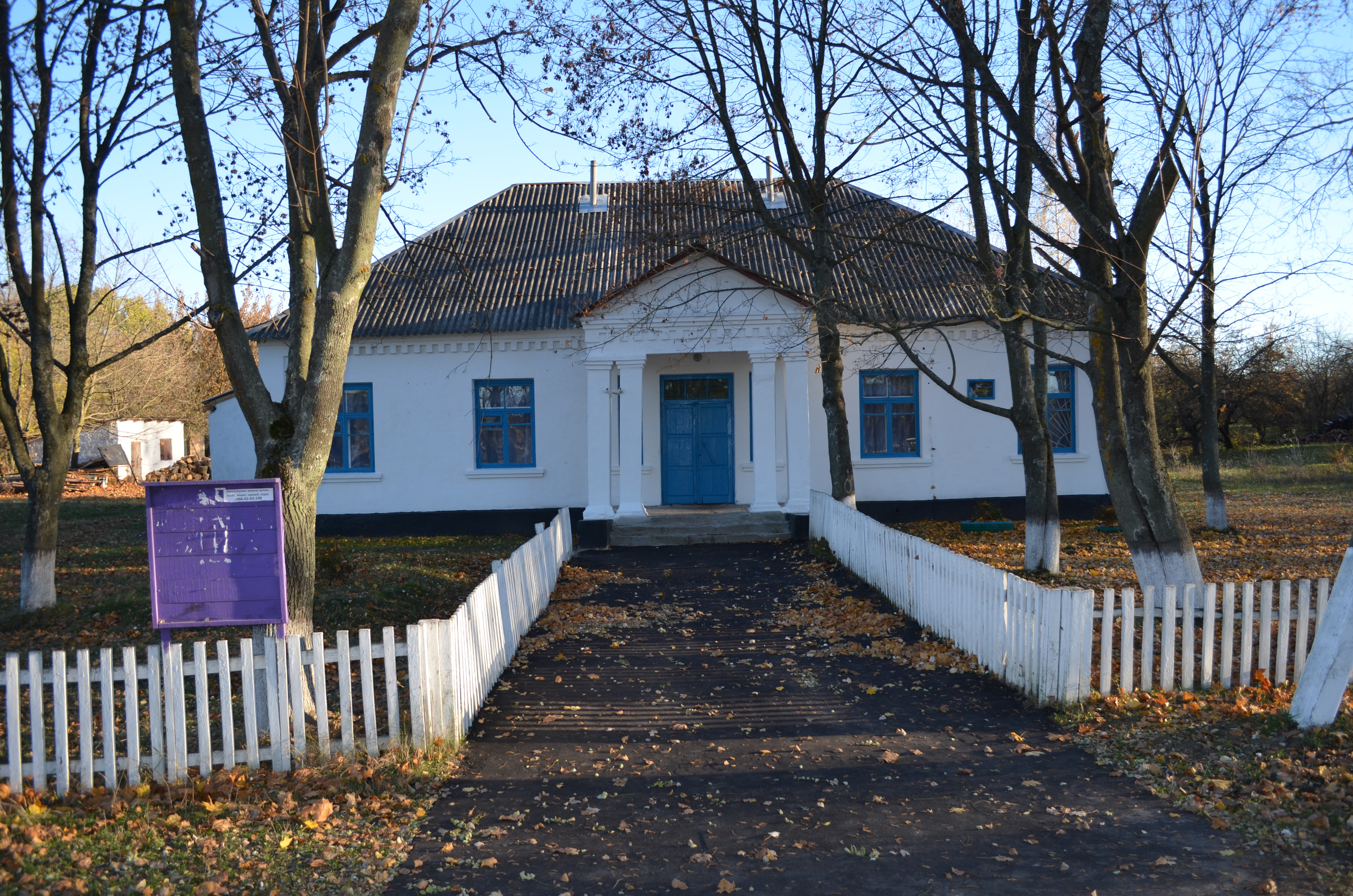 с. Сантарка. Клуб.